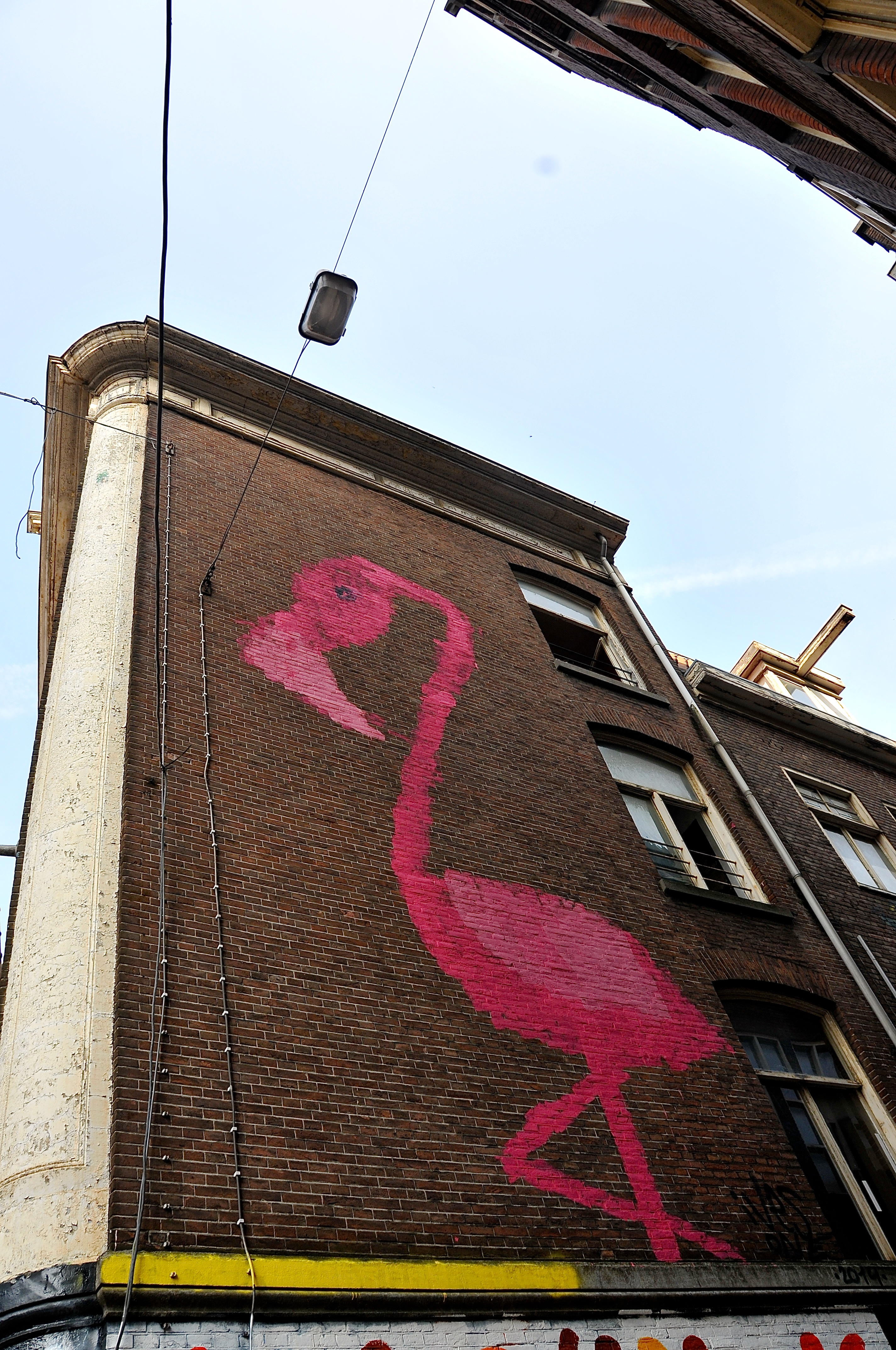 De slopershamer werd afgelopen april driftig gehanteerd in de Spuistraat en Wijdesteeg. De garage en aanliggende krakerspanden worden gesloopt en vervangen door koopappartementen en bedrijfsruimten.